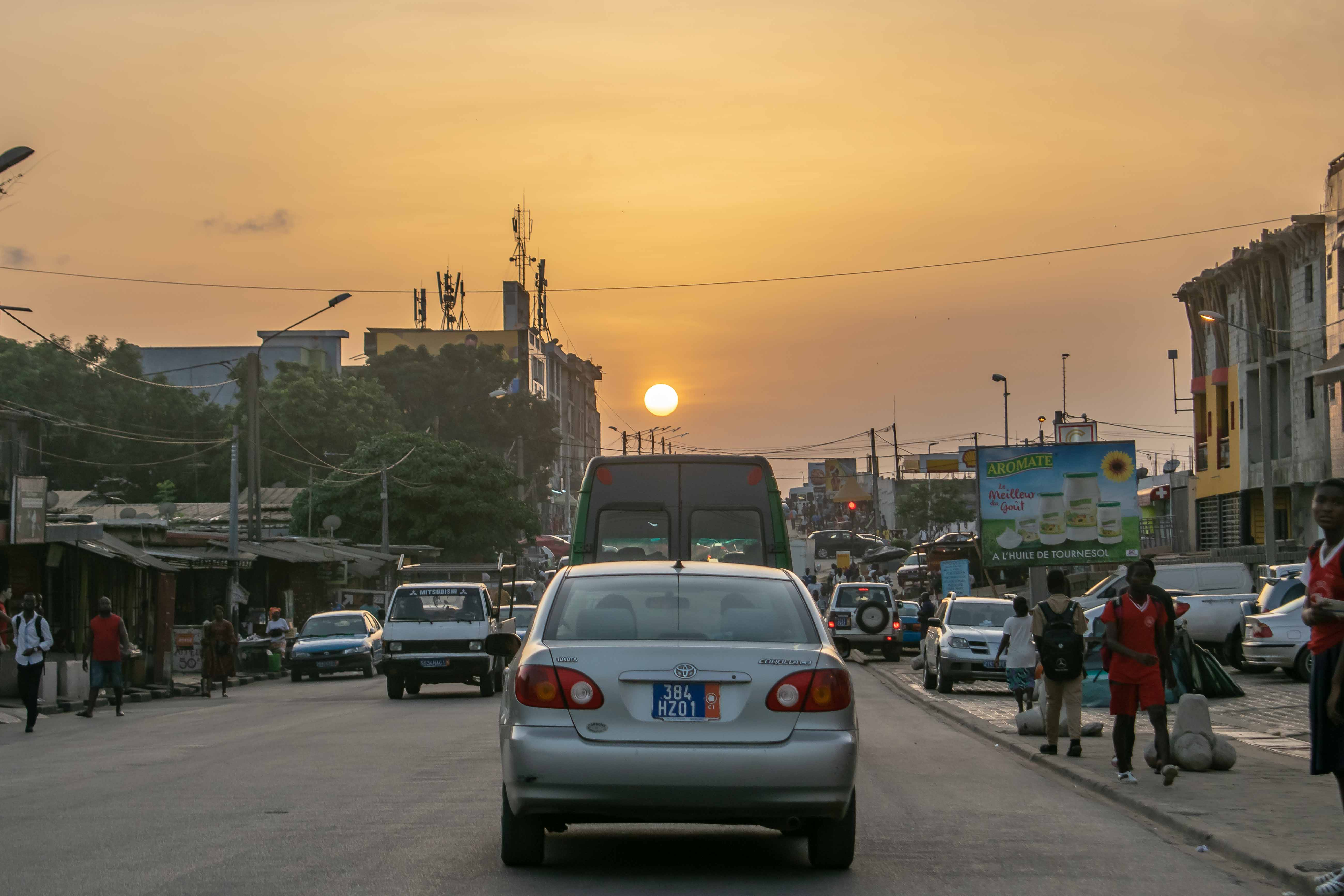 un couché de soleil à l'horizon d'une rue de la commune de yopougon This is an image with the theme "Africa on the Move or Transport" from: Ivory Coast